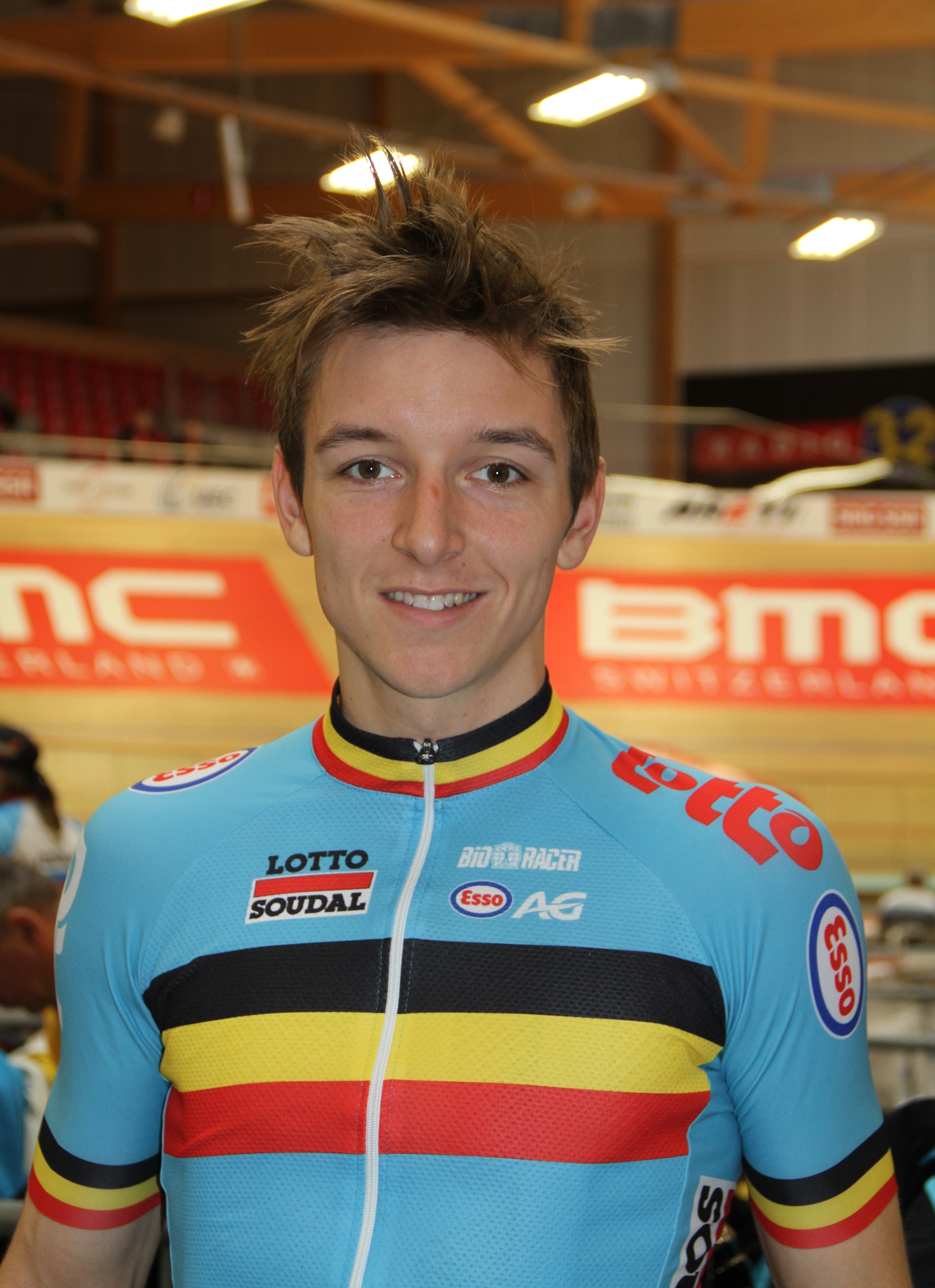 Jasper De Buyst, belgischer Radsportler The making of this document was supported by the Community-Budget of Wikimedia Germany.